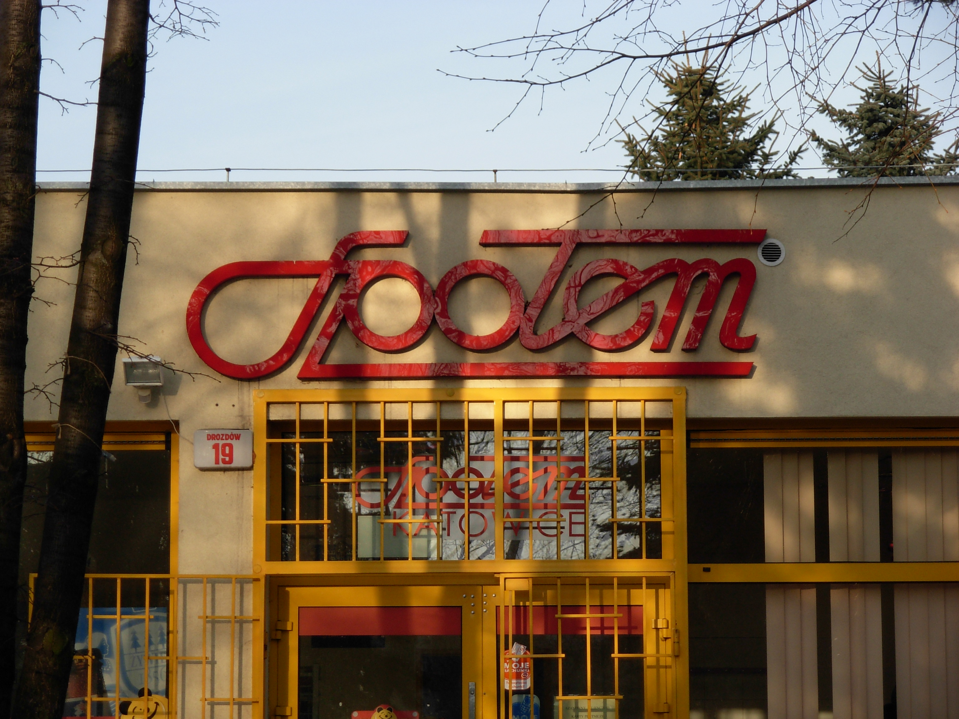 Społem.